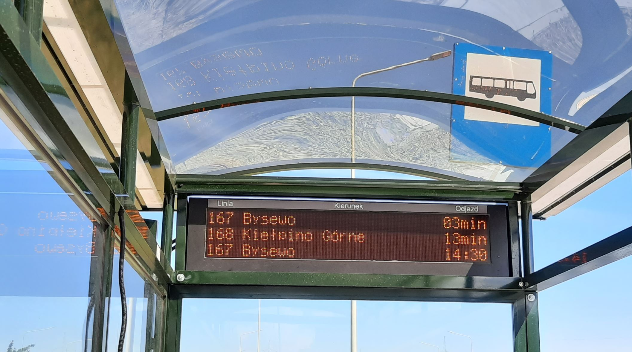 System Informacji Pasażerskiej (SIP) w Gdańsku - mała tablica diodowa; 3 wiersze.